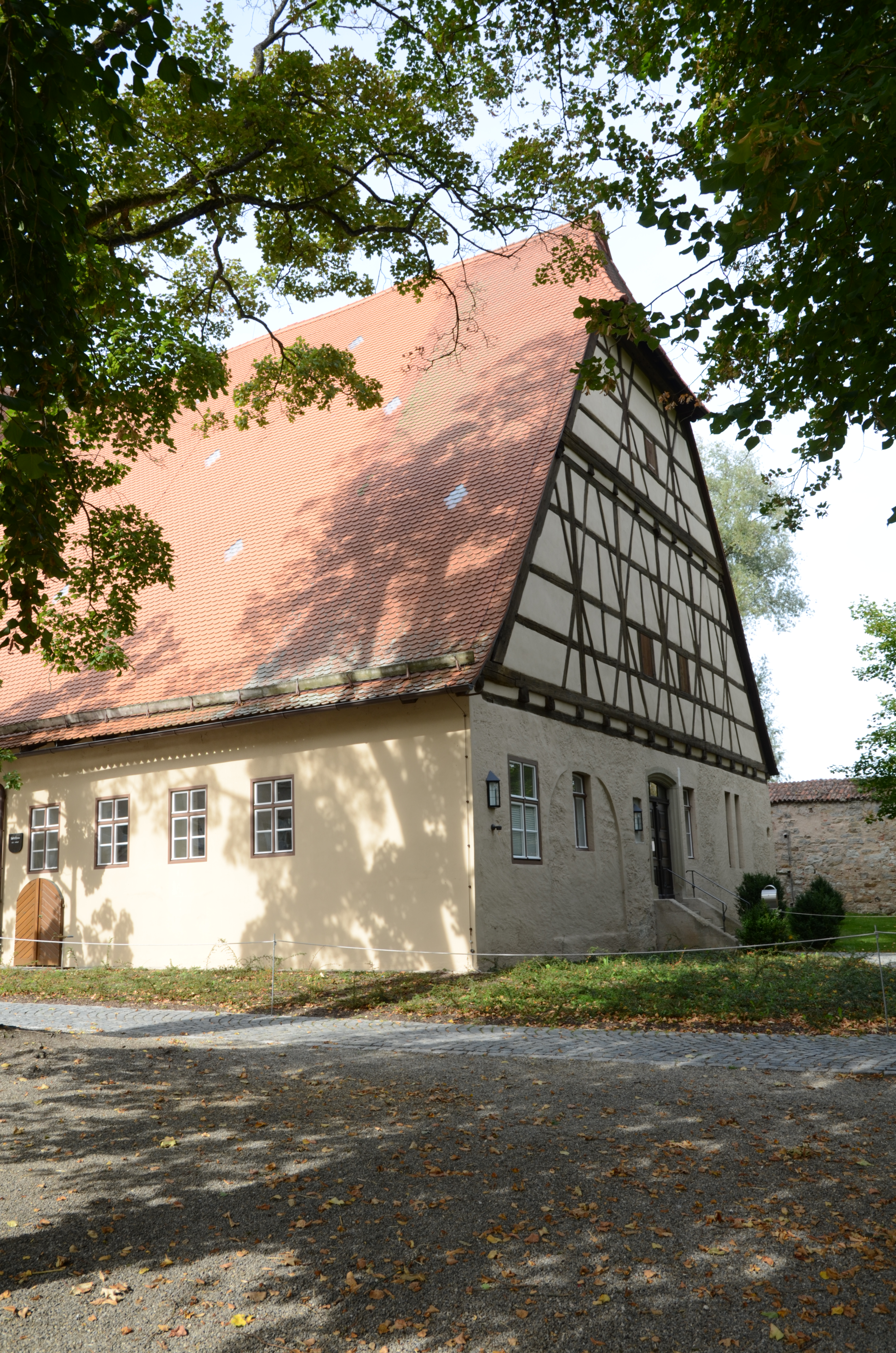 Dinkelsbühl Dr.-Martin-Luther-Straße 10